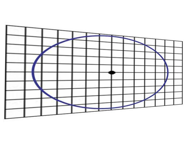 Modificado de File:Circulo 002 ttt.JPG, es otra modificación del plano contenedor (Homología)